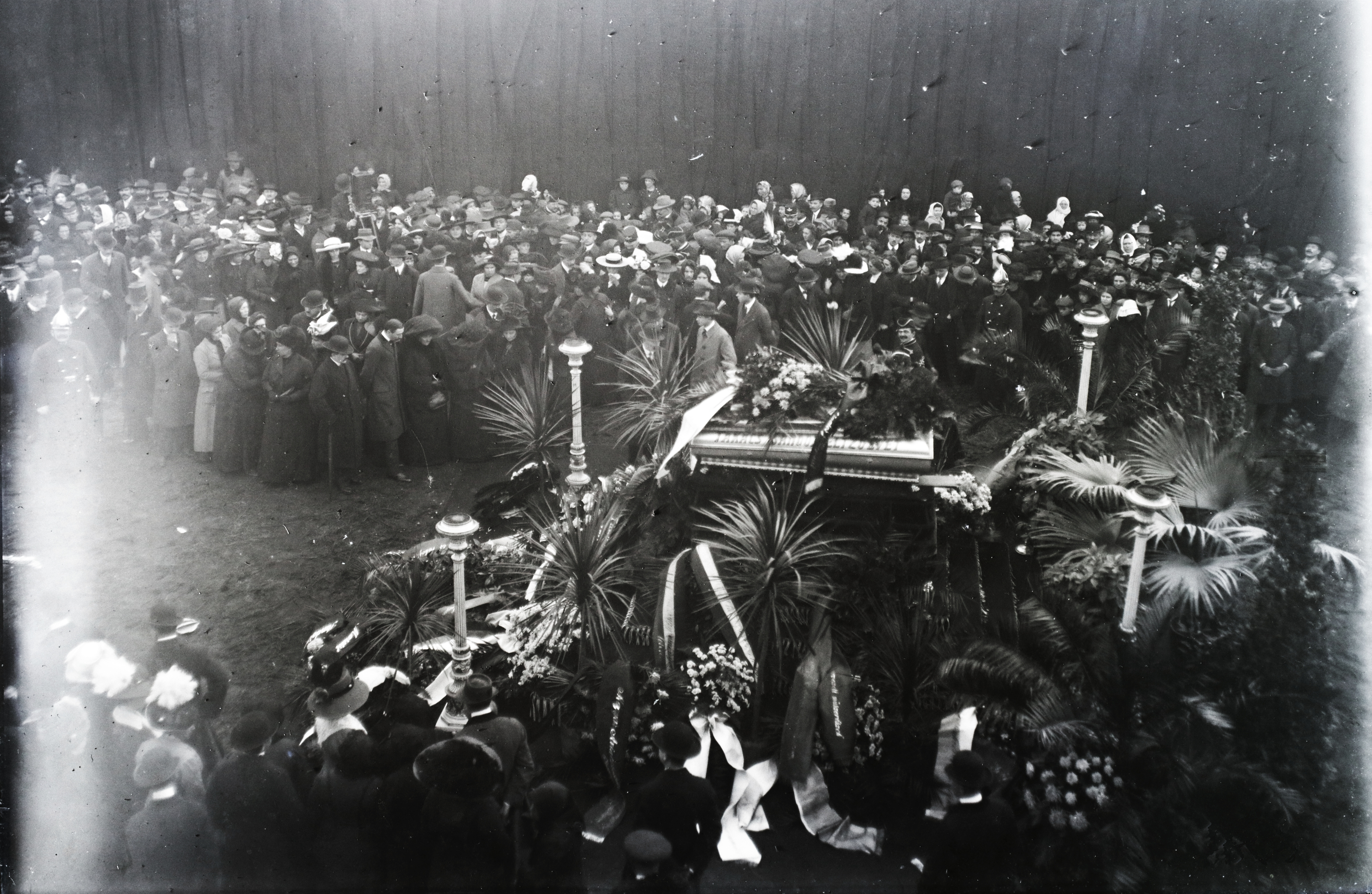 Takács Sándor ravatala és temetése 1912. Október. Leltári jelzet: 298.